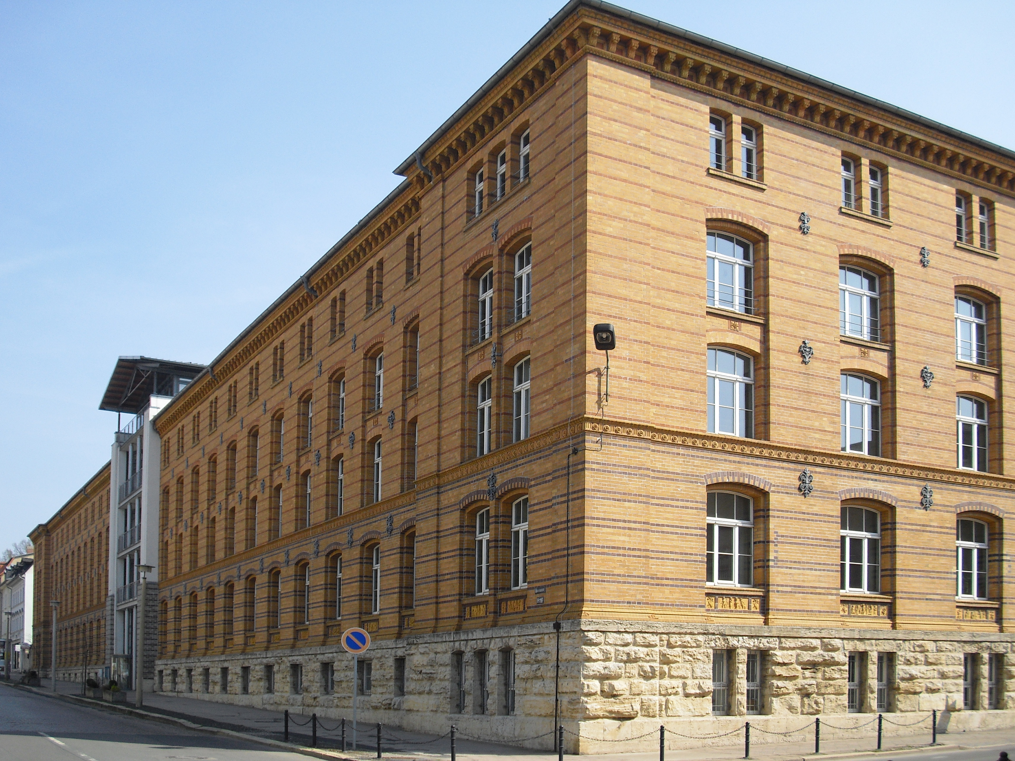 ehemaliges Fabrikgebäude Christian Zimmermann & Sohn in Apolda, Bahnhofstraße 28; unter Denkmalschutz; heute Sitz des Landratsamts Weimarer Land